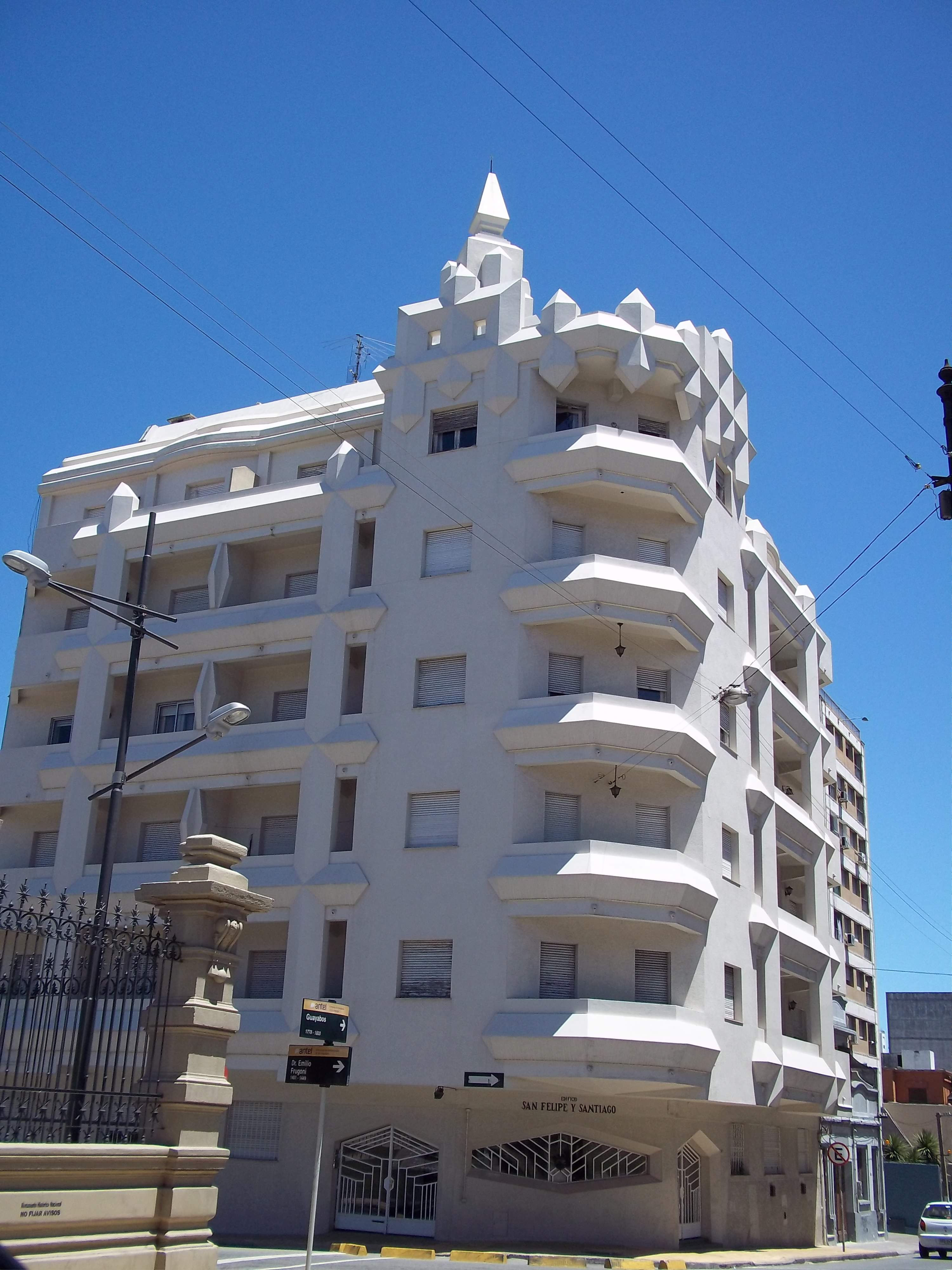 Edificio San Felipe y Santiago, construido en 1941 por el arquitecto Humberto Pittamiglio. Ubicado en la esquina del pasaje Emilio Frugoni y la calle Guayabo (detrás de la Universidad de la República y frente a la Iglesia Anglicana), es desde el inicio un edificio de apartamentos de estilo Art Deco.